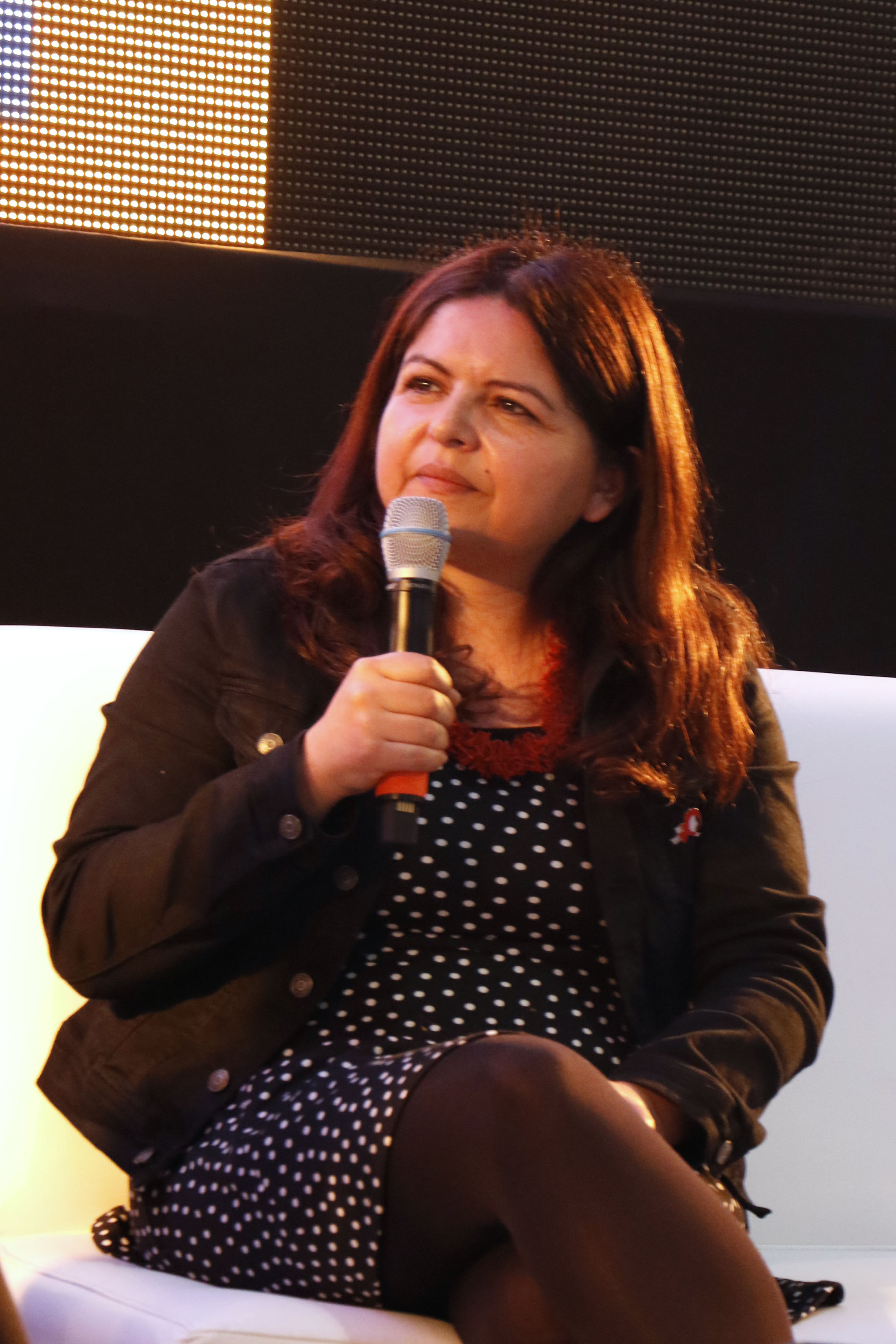 Lunes 16 de octubre de 2017 En el marco de la XVII Feria Internacional del Libro en el Zócalo 2017, en el stand de Chile, se realizó la charla Autobiografía en el cómic en torno al libro Ídolo, una historia casi real de Marcela Trujillo, estuvo presente la autora y Abril Castillo. Fotografía: Tania Victoria/ Secretaría de Cultura CDMX